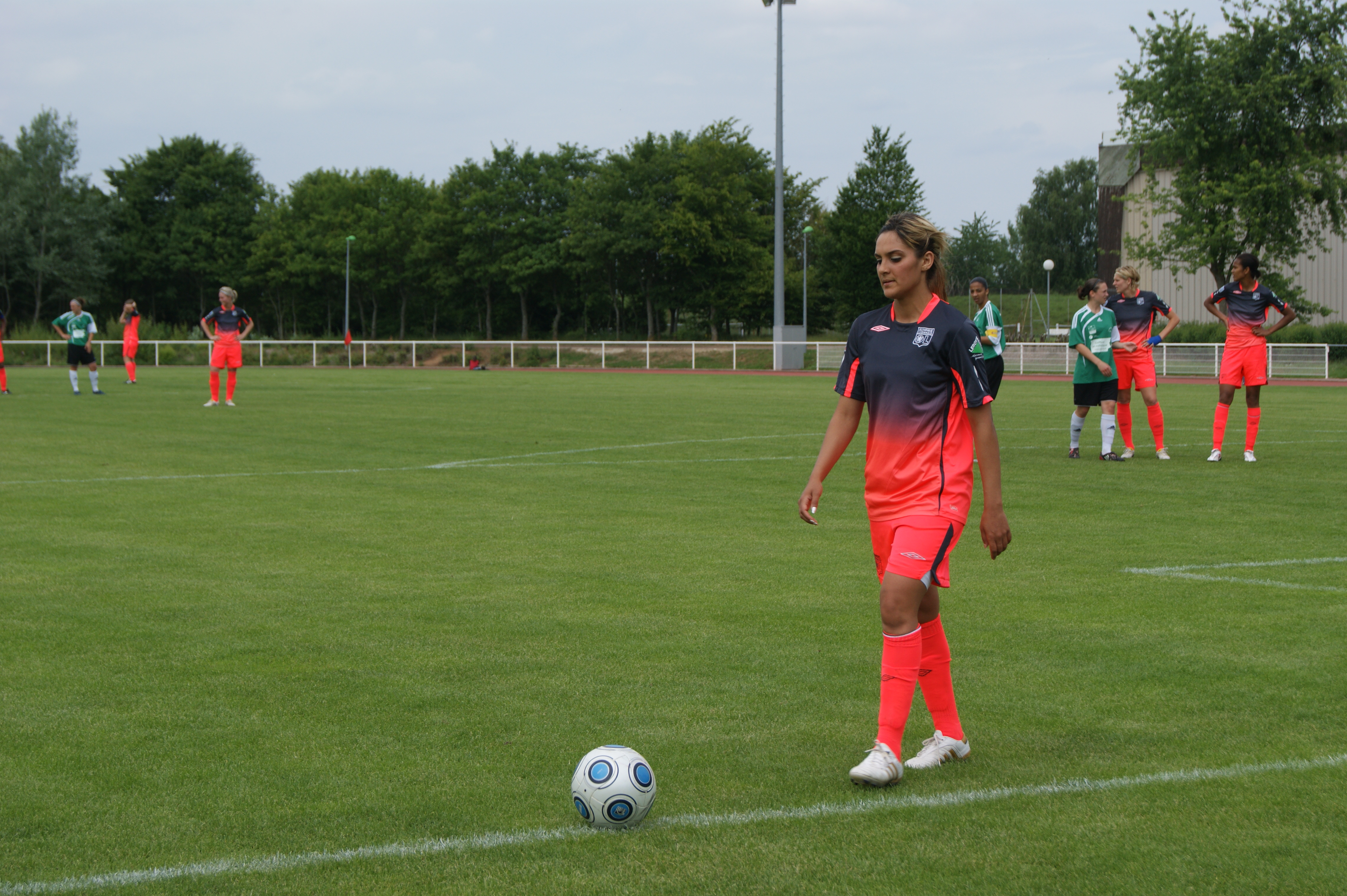 Louisa Nécib lors du match AS Montigny-le-Bretonneux-Olympique lyonnais, dernière journée du championnat de France de football féminin 2009-2010.